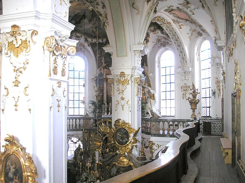 Wallfahrtskirche St. Maria (Andechs, Landkreis Starnberg, Oberbayern). Der Kirchenraum von der Galerie. Eigene Aufnahme, Sept. 2006 / Andechs Monastery: Pilgrimage church of St. Mary, (Upper Bavaria, Germany). Interior from the Gallery. Own photo, Sept. 2006